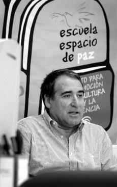 Foto Bina 2